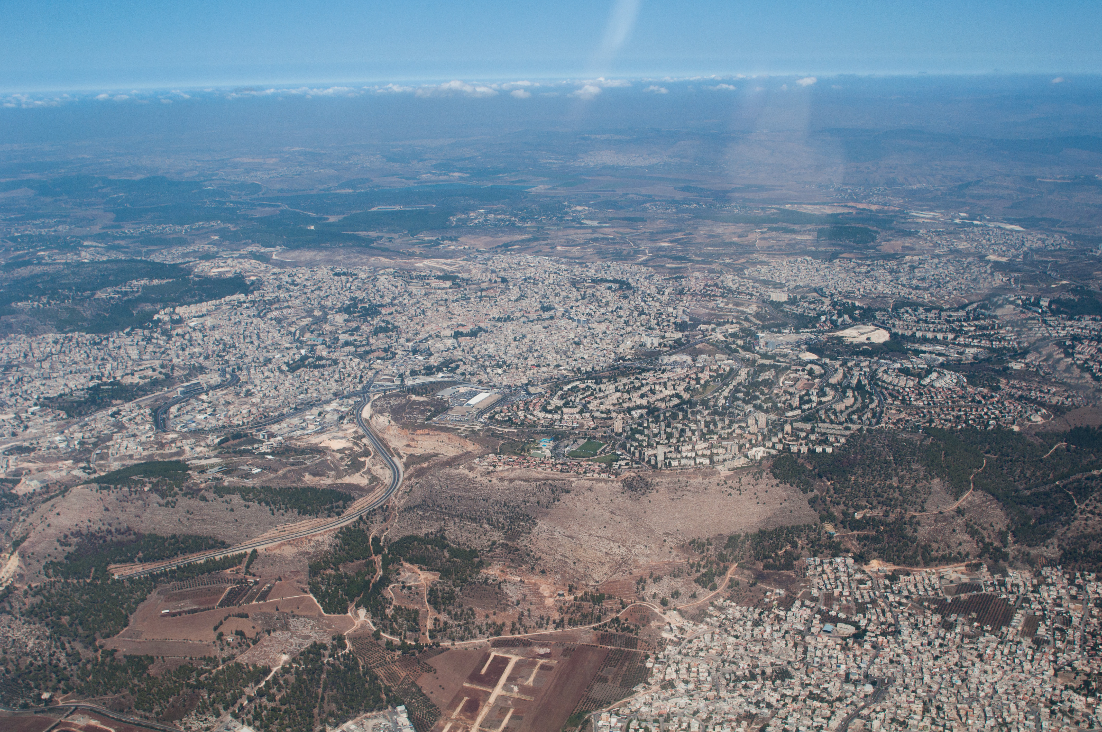 העיר נצרת